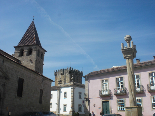 1a de aprilo 2019